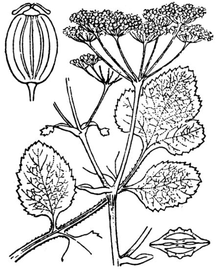 Hippolyte Coste - Flore descriptive et illustrée de la France, de la Corse et des contrées limitrophes, 1901-1906 - This image is in public domain because its copyright has expired.